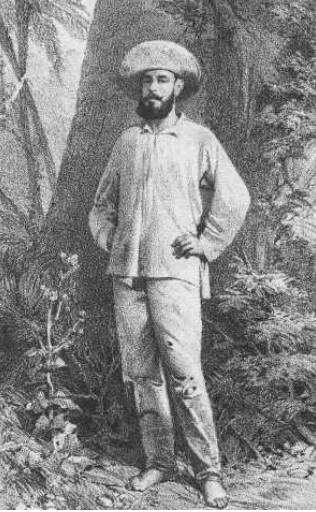 Antonio del Rosal y Vázquez de Mondragón